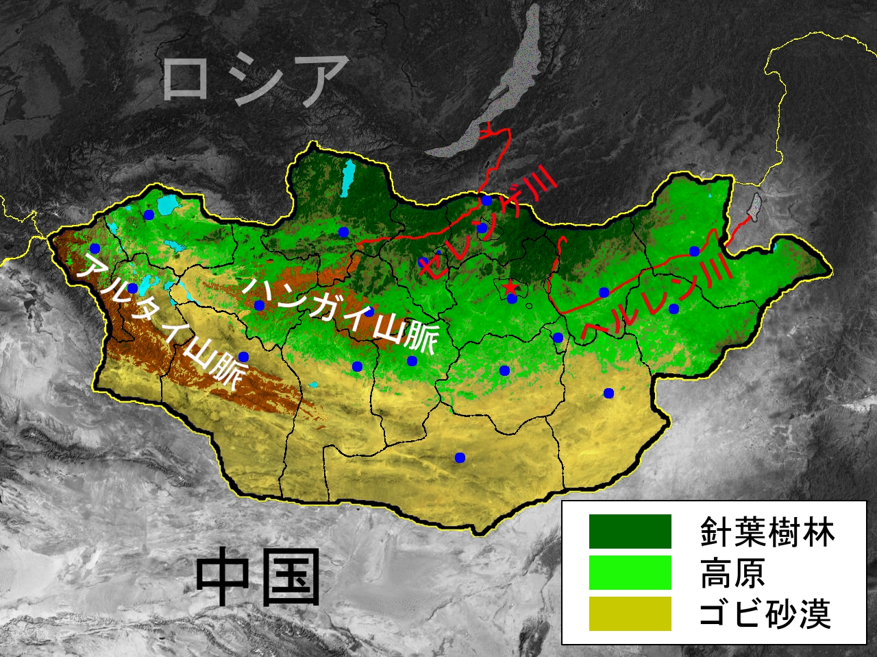 これは、モンゴルの地形地図です。 この地図には、関連地図が存在します。 次のURLサイトでお確かめください。[1]